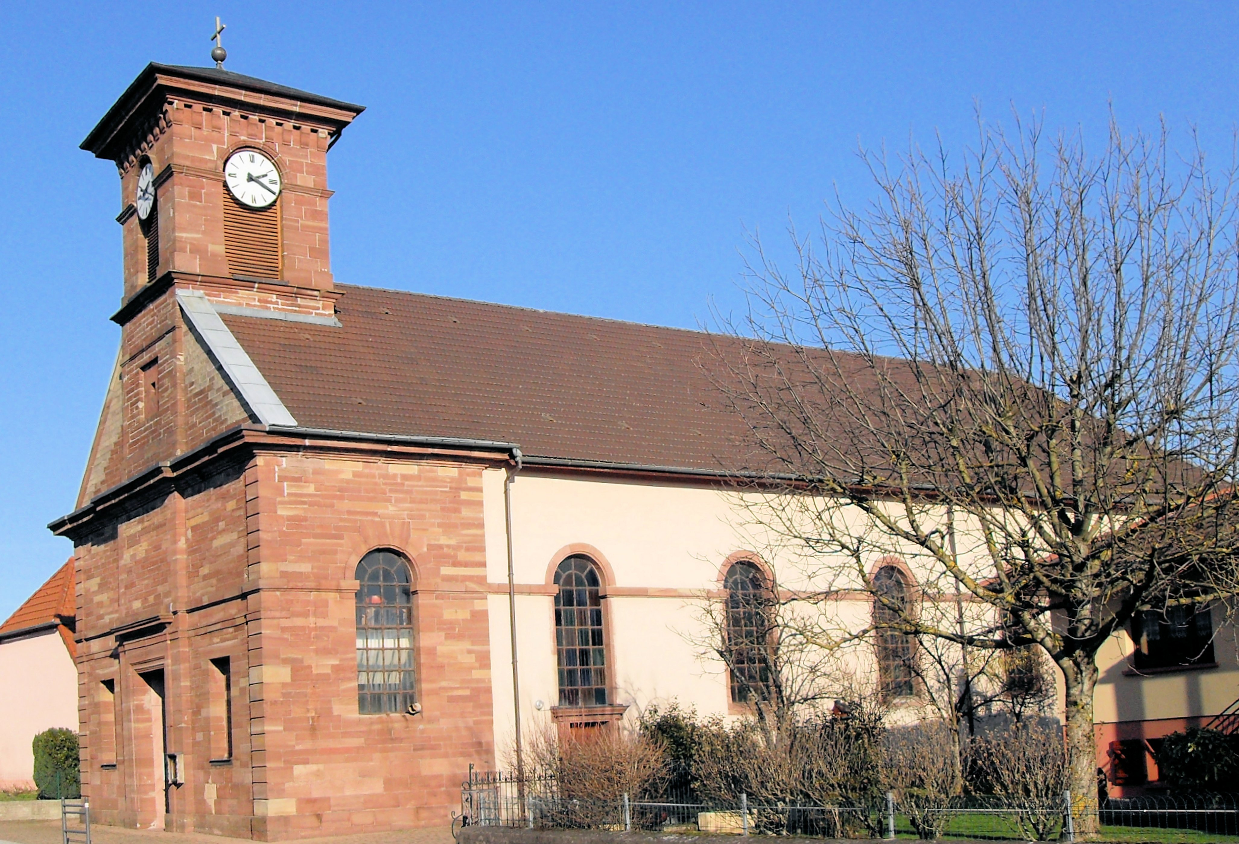 L'église Sainte-Suzanne à Bessoncourt